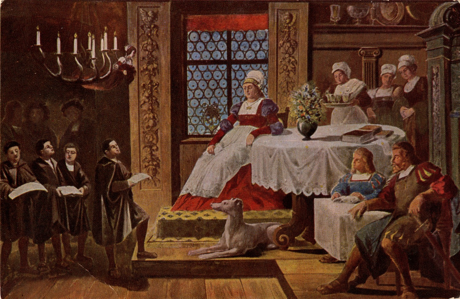 Luther als Kurrendeschüler vor Frau Cotta singend. Nach einem Gemälde von Prof. Weiß im Lutherhaus zu Eisenach.